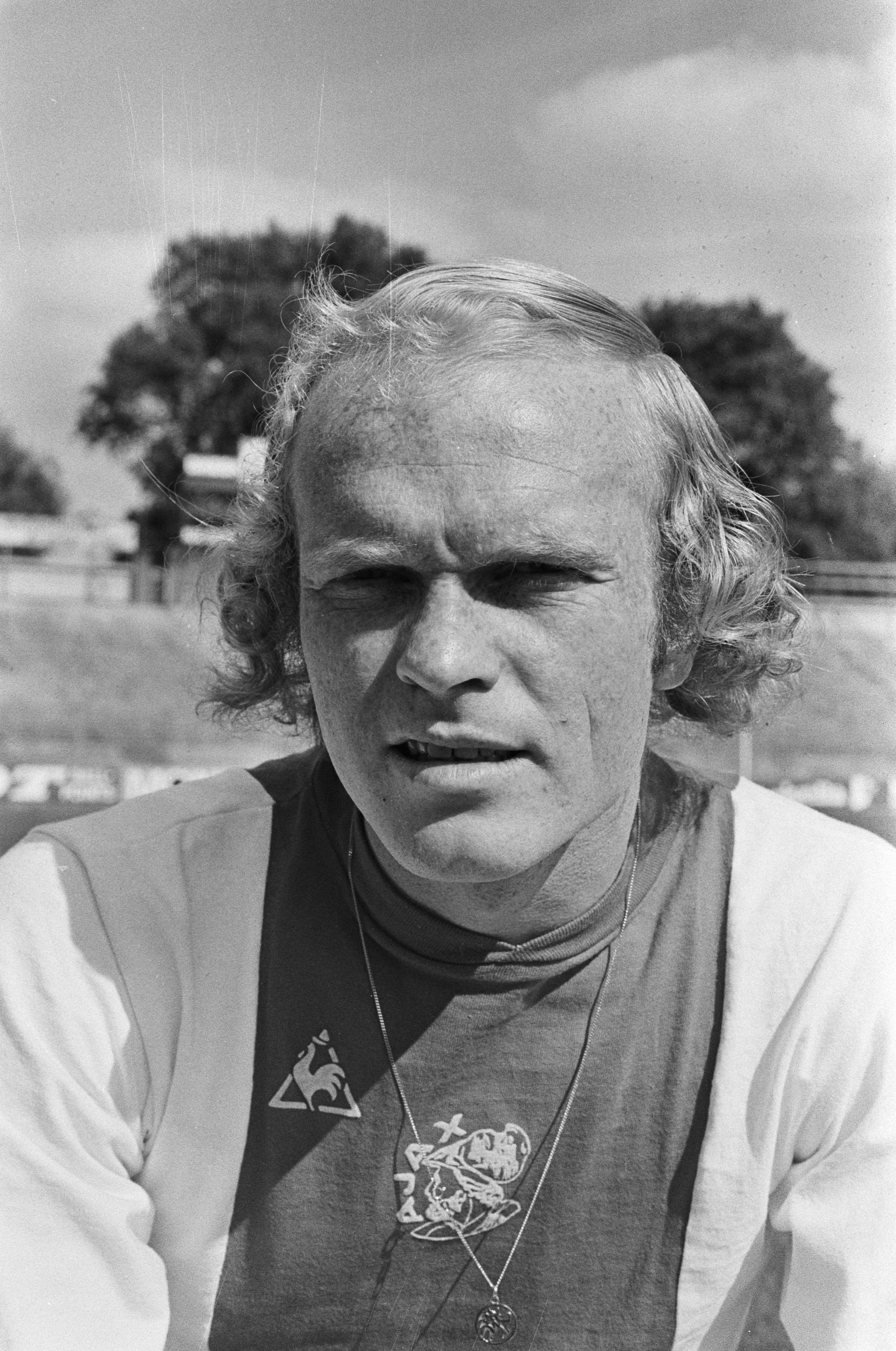 Collectie / Archief : Fotocollectie Anefo Reportage / Serie : [ onbekend ] Beschrijving : Ajax presenteert A-selectie voor komend seizoen; nieuwe spits Ruud Geels Datum : 6 augustus 1974 Locatie : Amsterdam Trefwoorden : portretten, voetbal, voetballers Persoonsnaam : Geels, Ruud Fotograaf : Peters, Hans / Anefo Auteursrechthebbende : Nationaal Archief Materiaalsoort : Negatief (zwart/wit) Nummer archiefinventaris : bekijk toegang 2.24.01.05 Bestanddeelnummer : 927-3727